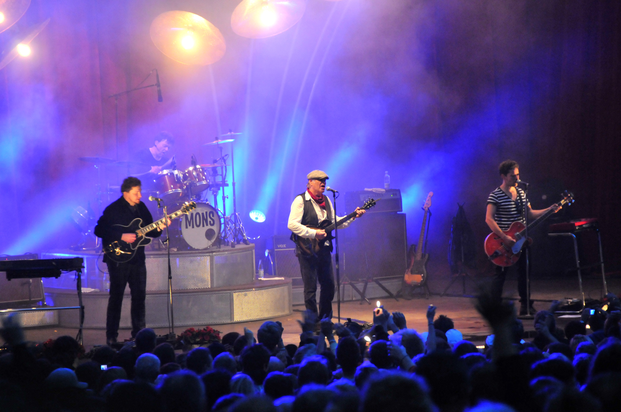 From Kloeften Festival, Haderslev, Denmark